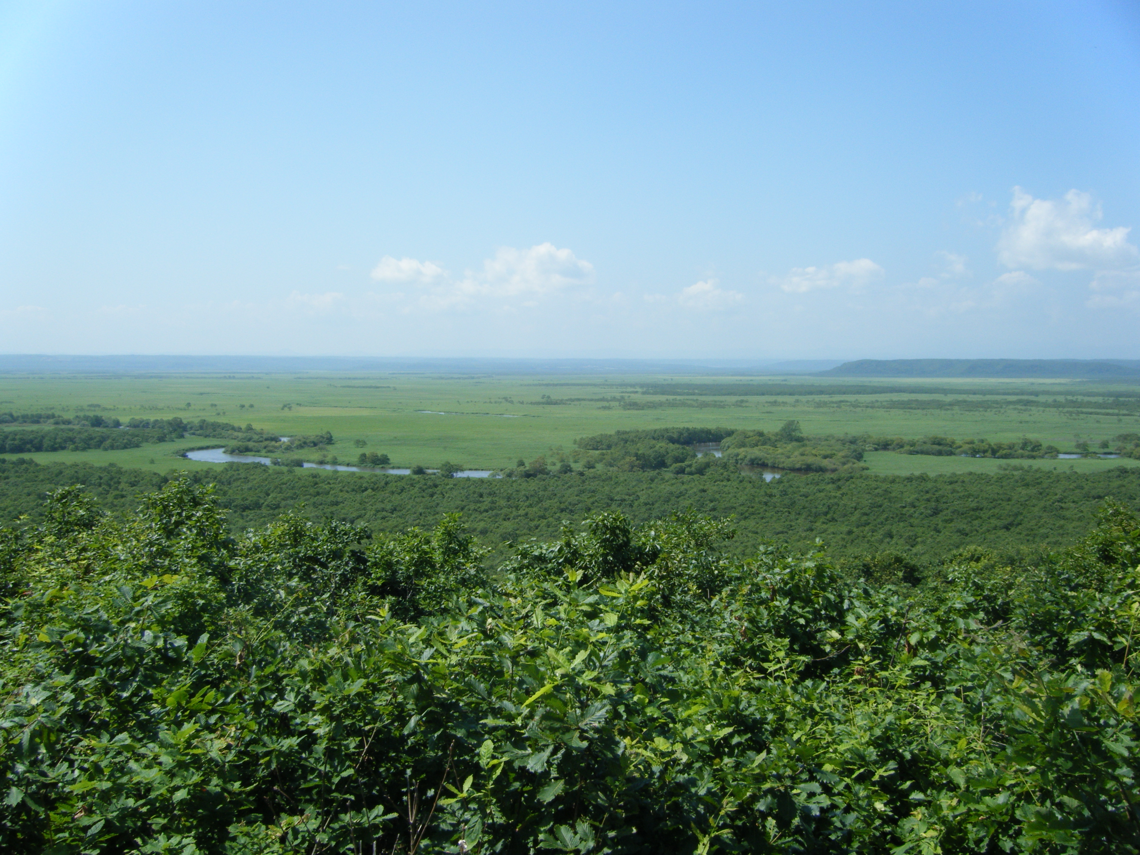 細岡展望台から望む釧路湿原と釧路川。